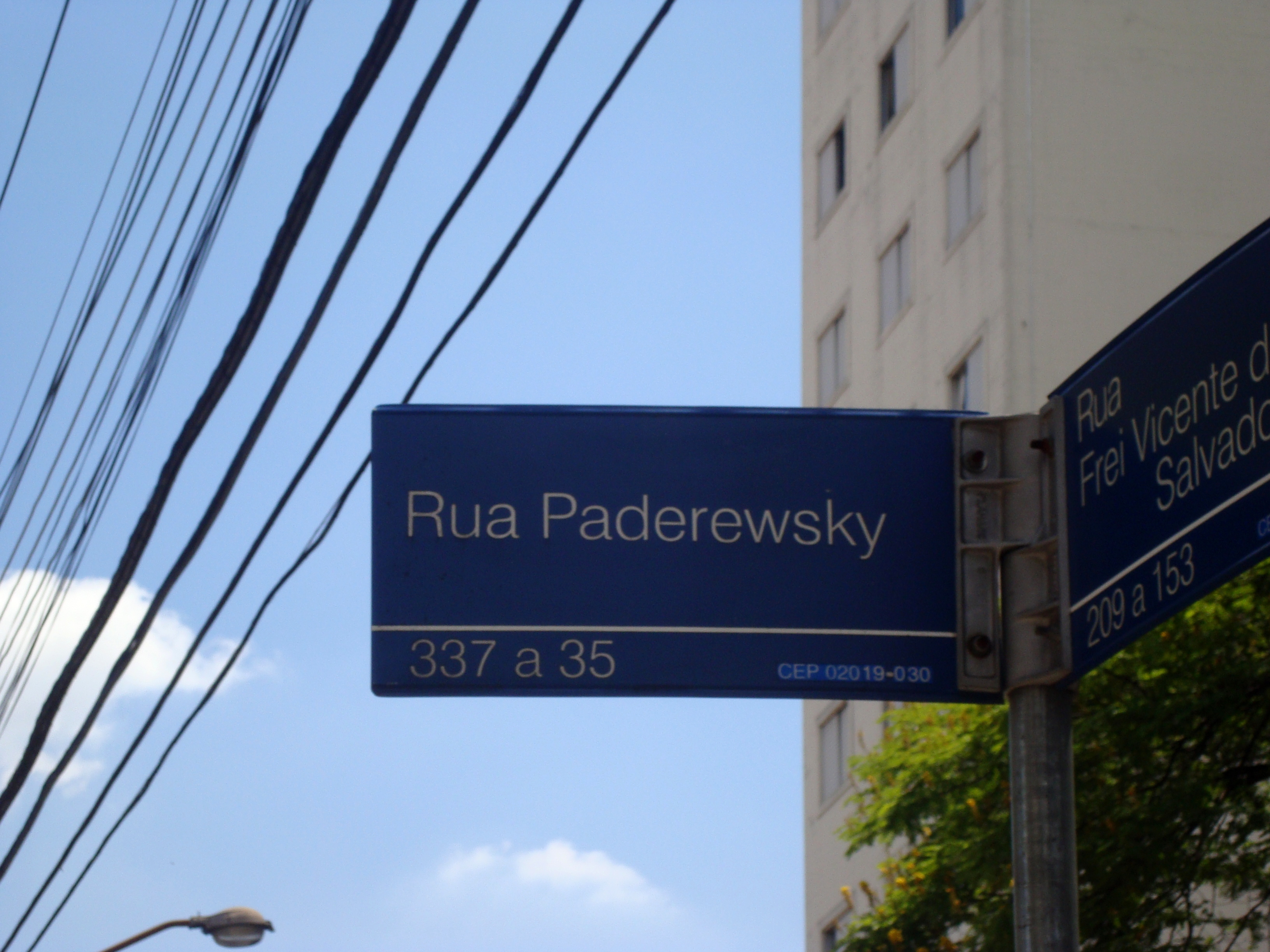 Placa da Rua Paderewsky no bairro de Santana, historica pois abrigou elementos de um grupo de protesto do século XX